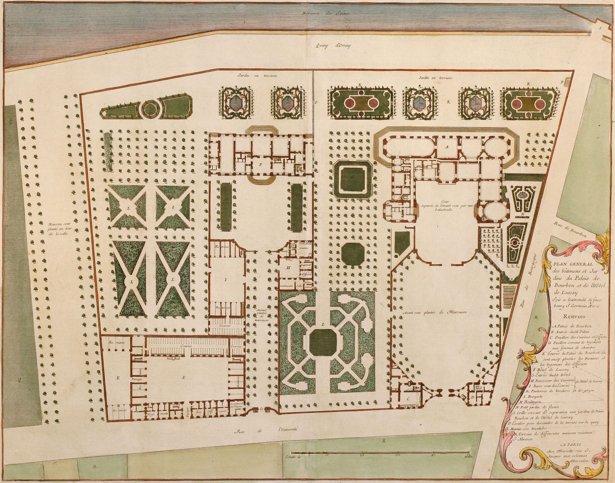 Übersichtsplan des Palais de Bourbon und des Hôtels de Lassay in Paris